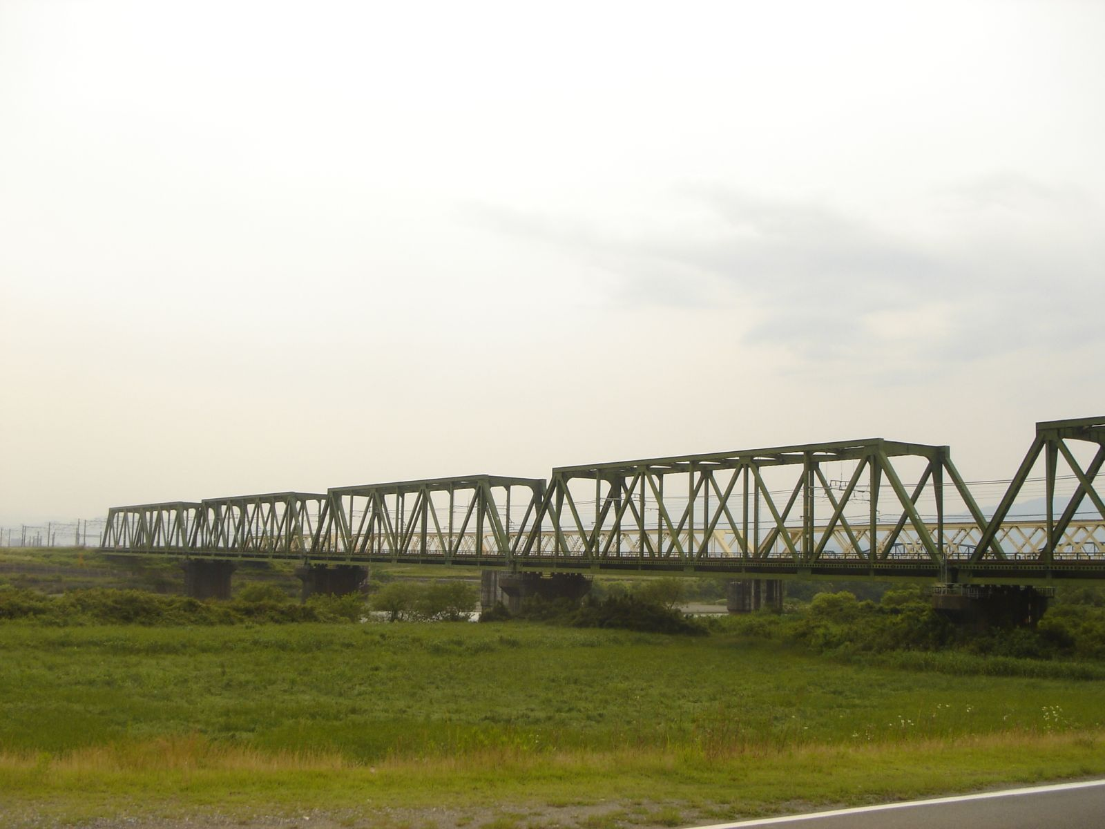 揖斐川橋梁 (東海道本線)、揖斐川左岸（安八町側）下流より撮影